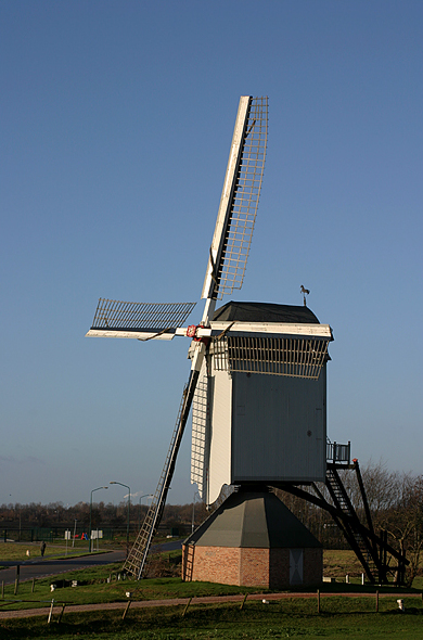 Foto gemaakt door: Joost Schouten